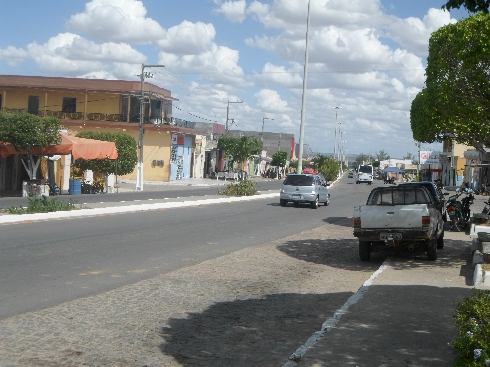 Avenida Manoel Elígio da Mota ou rodovia SE 230, em direção a Glória